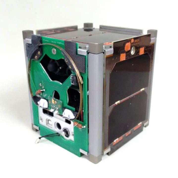 SUCHAI, Satellite of University of Chile for Aerospace Investigation. Primer nano satélite construido y lanzado al espacio por la Universidad de Chile. Lanzado al espacio el 23 de Junio de 2017.